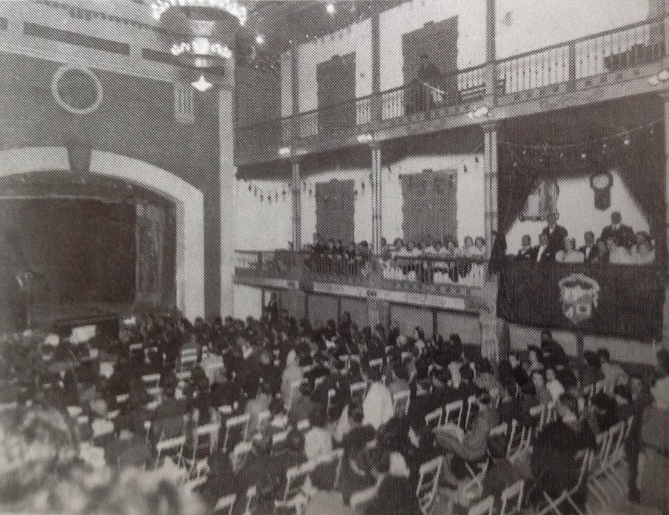 perspectiva del interior del teatro de Sonsón